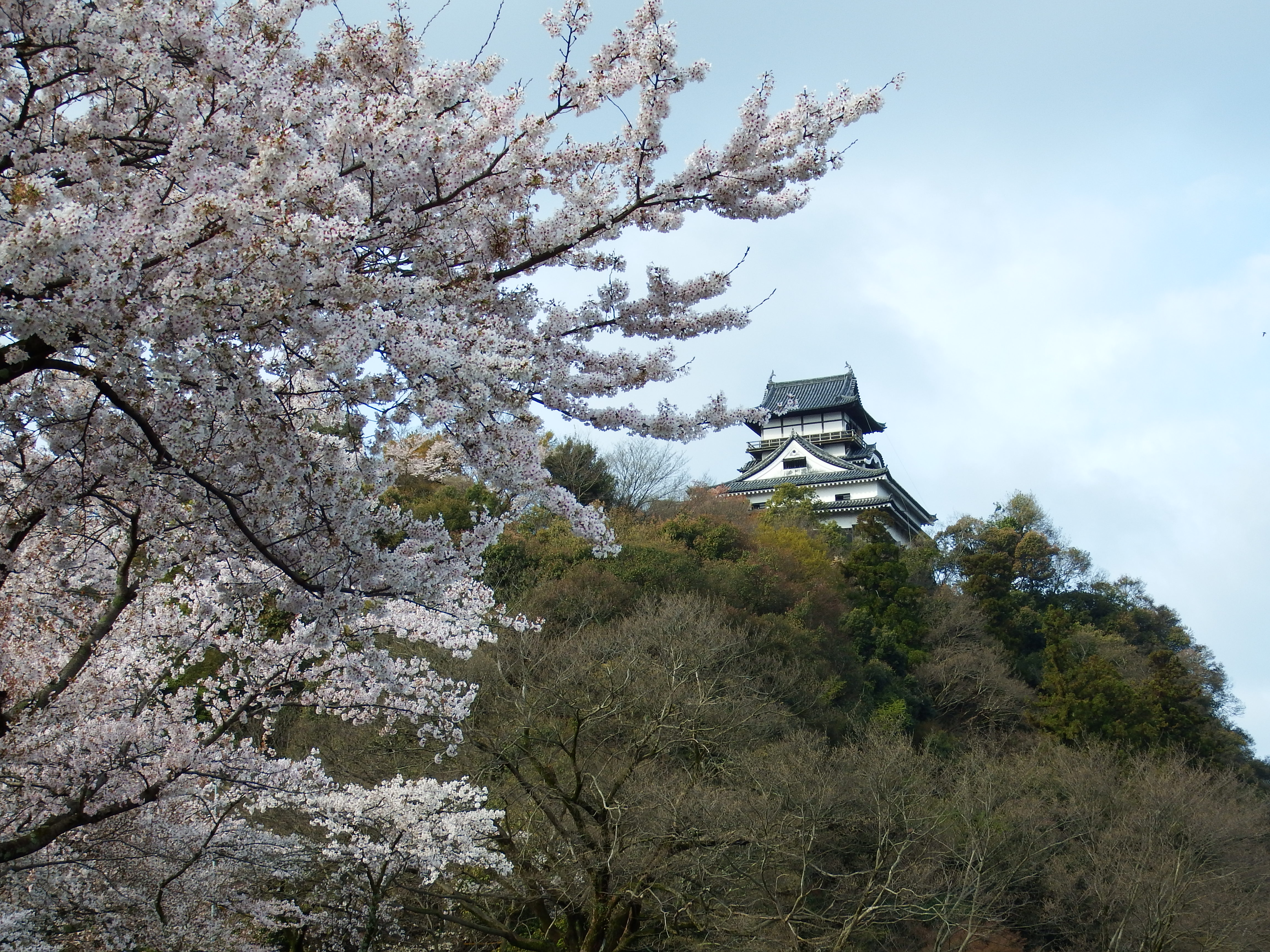 桜と犬山城